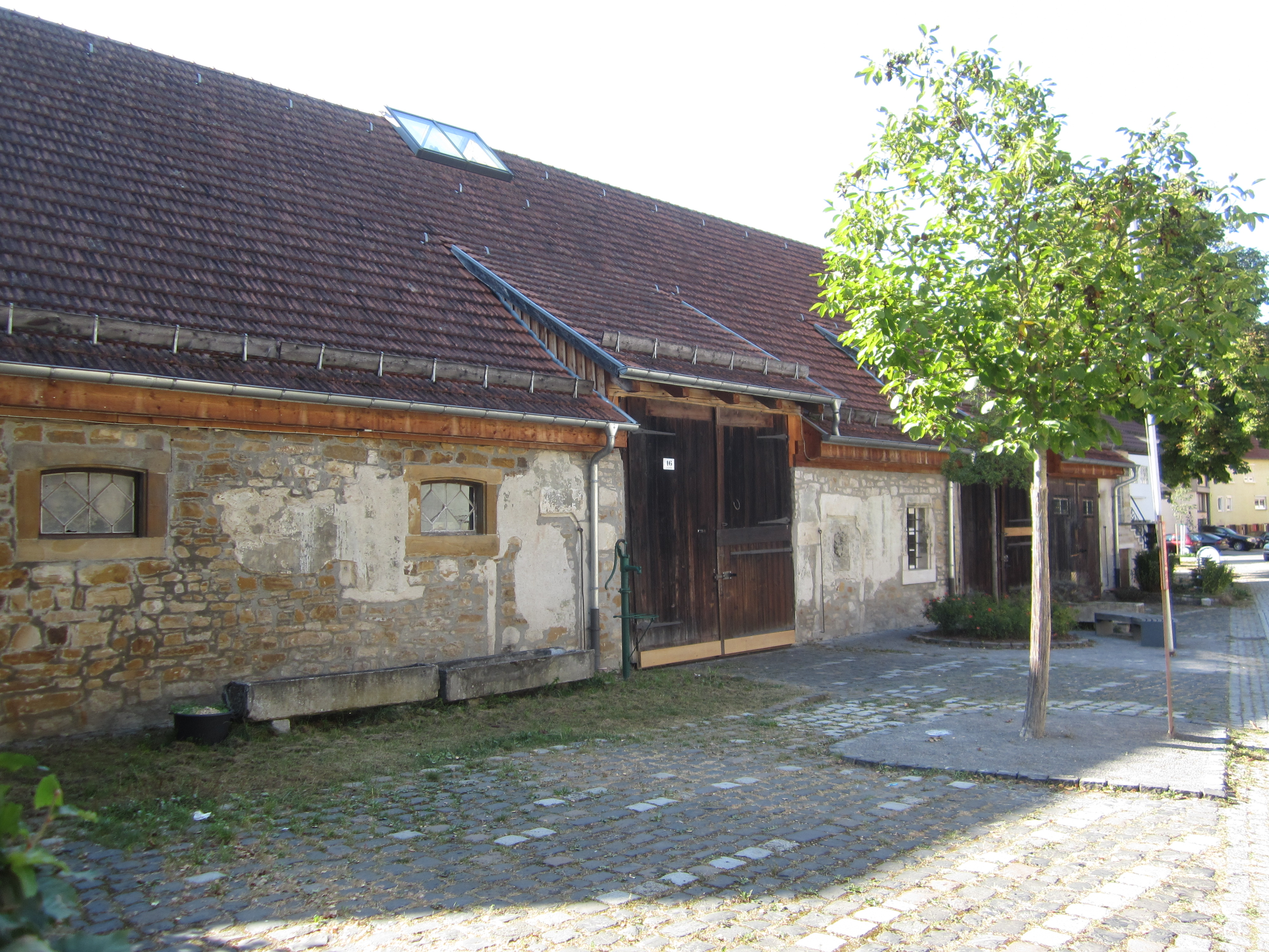 "Alter Farrenstall" in Faurndau, Im Freihof 16